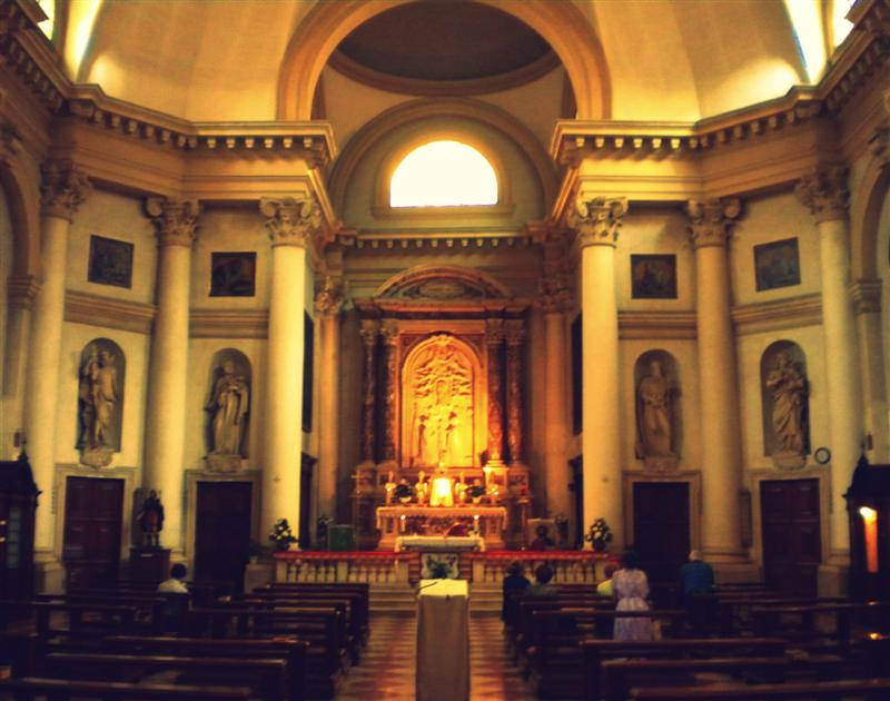 Interno della chiesa di Santa Lucia a Padova